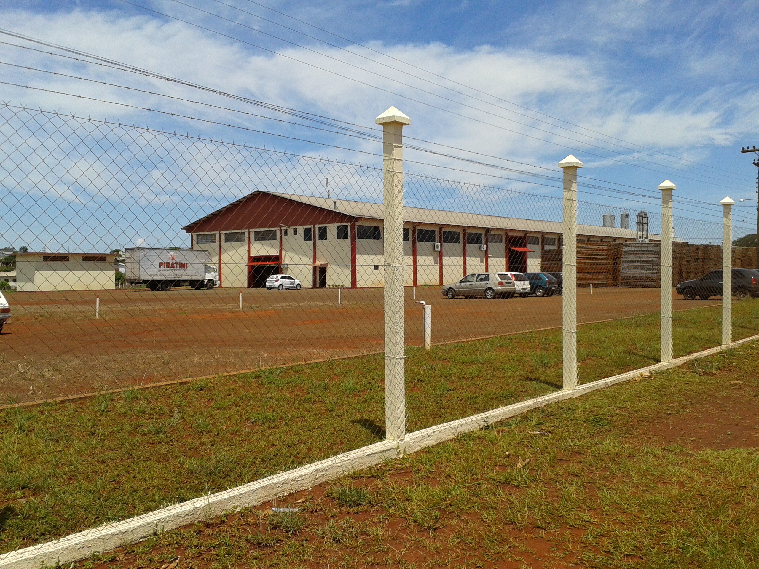 Fábrica de Móveis em Crissiumal.